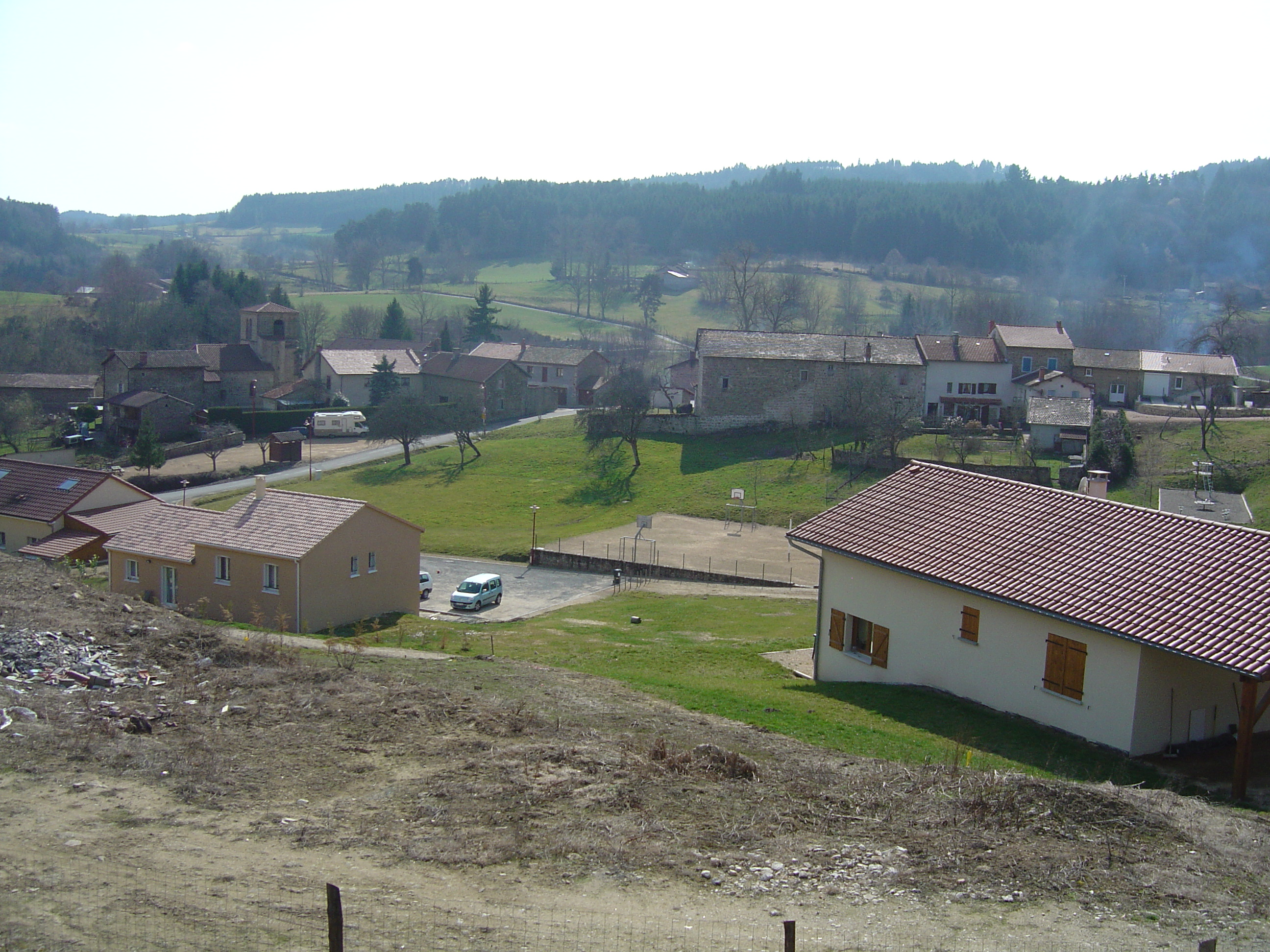 Centre du village de Thiolières